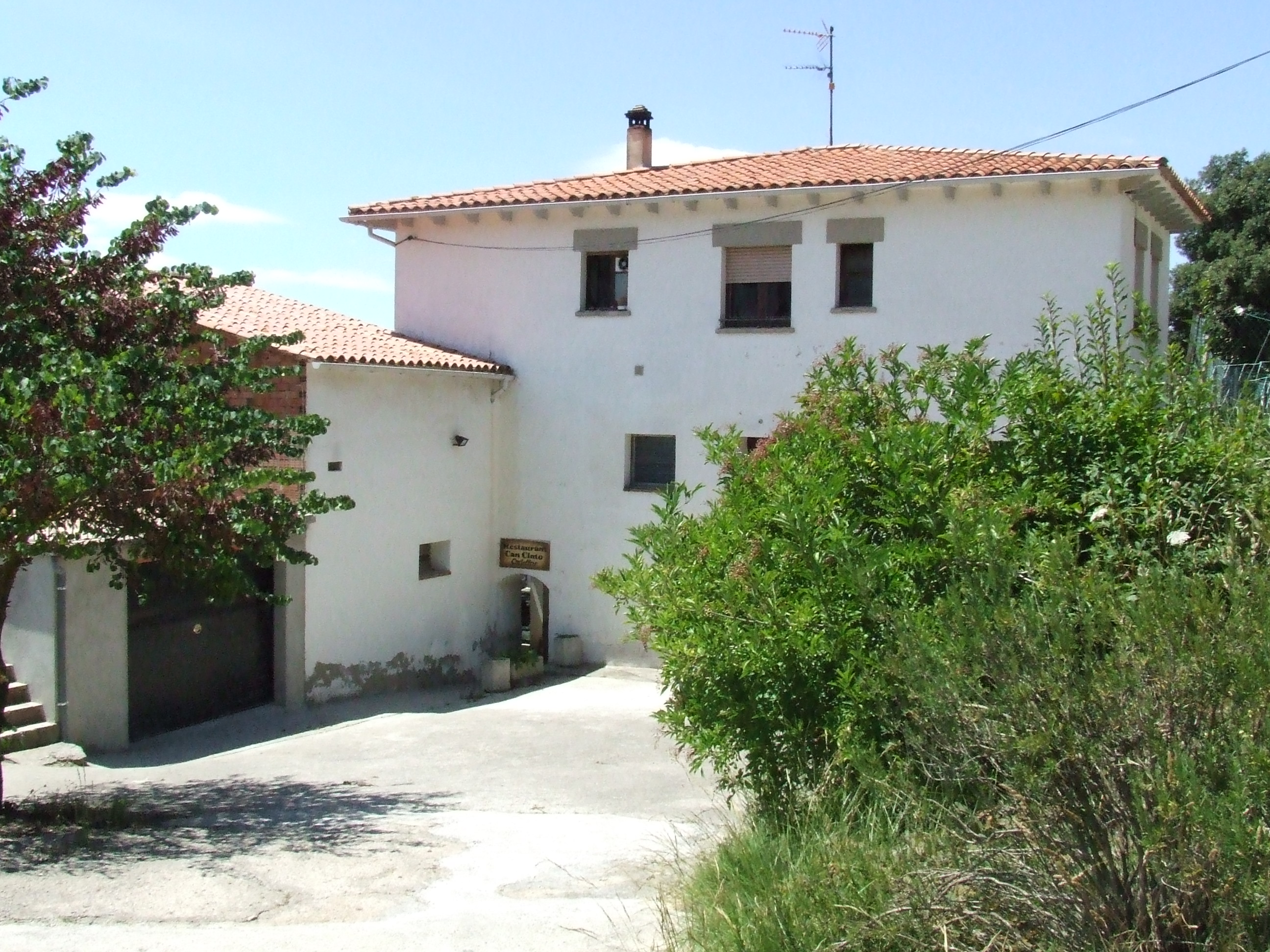 Cal Cinto (Castellcir, Moianès)